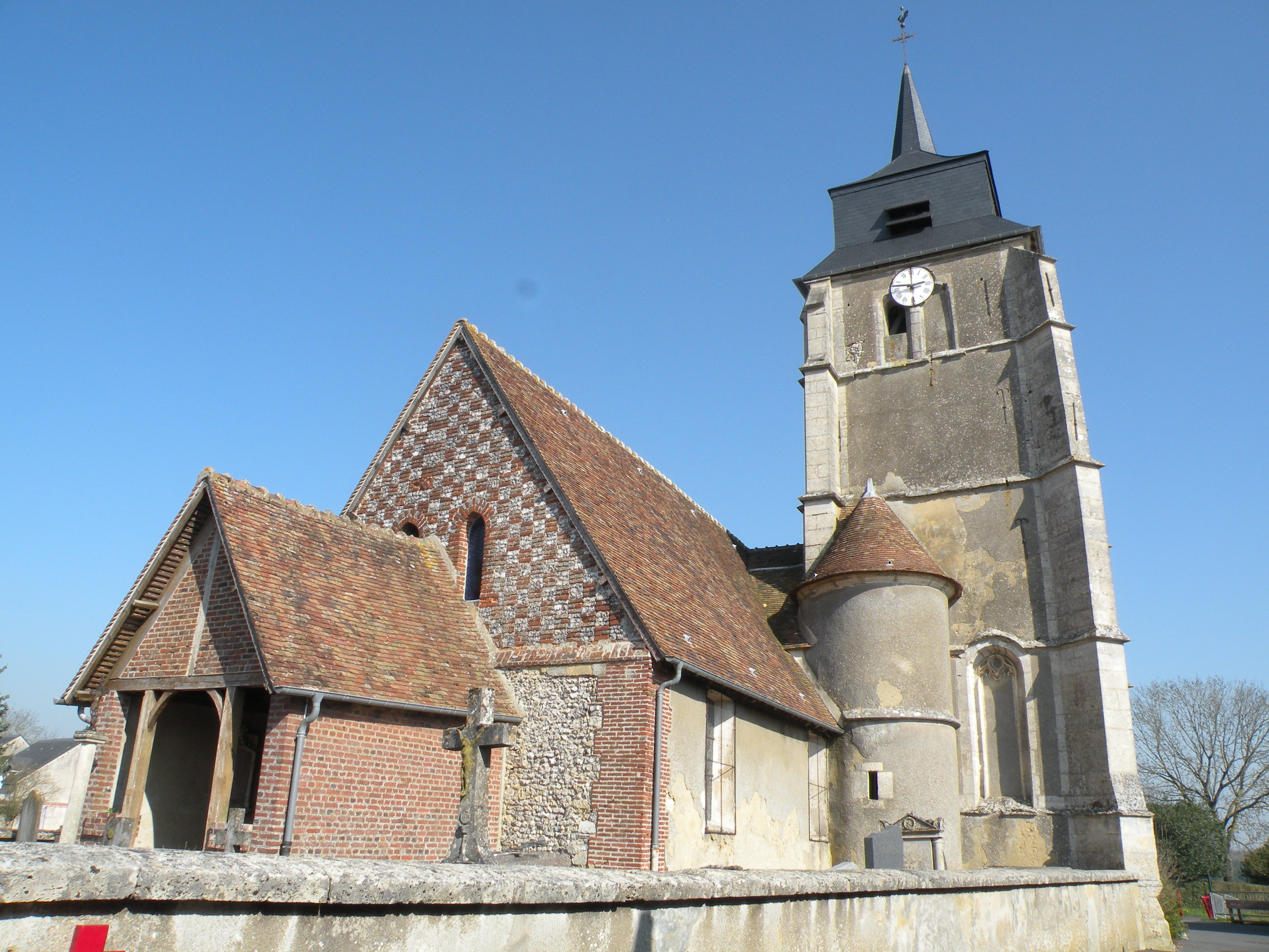 église Saint-Nicolas de Porcheux